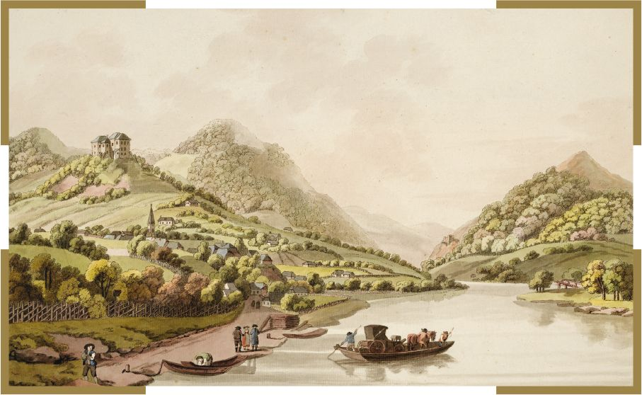 Brodišče ob Dravi pri Dravogradu.